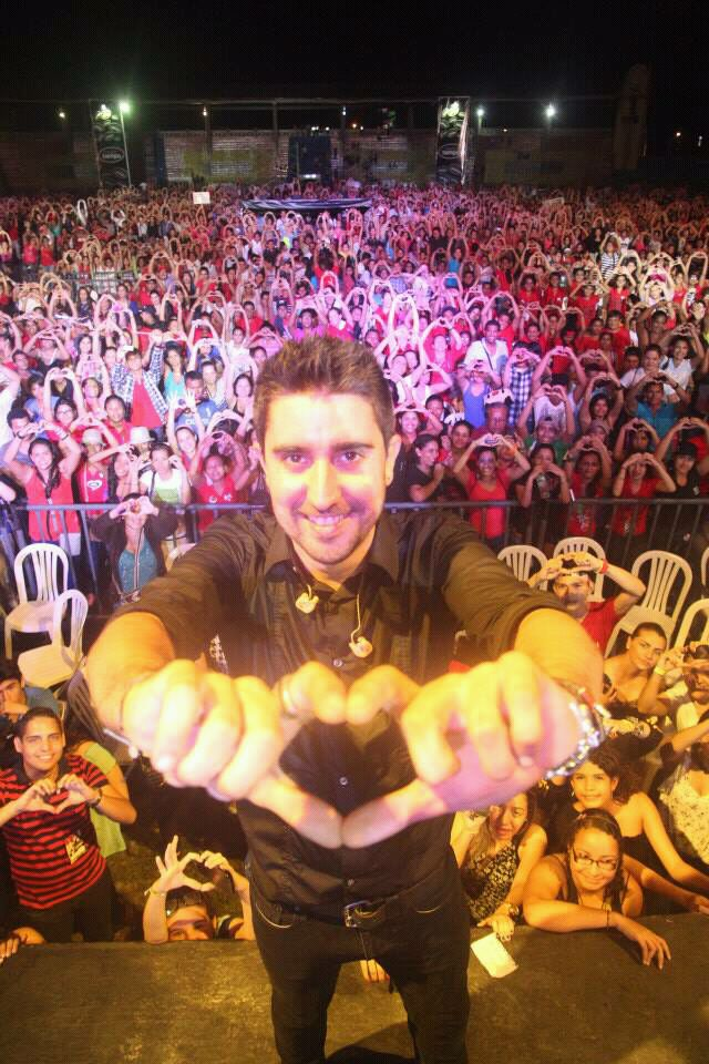 Alex Ubago en su Gira Mentiras Sinceras 2013